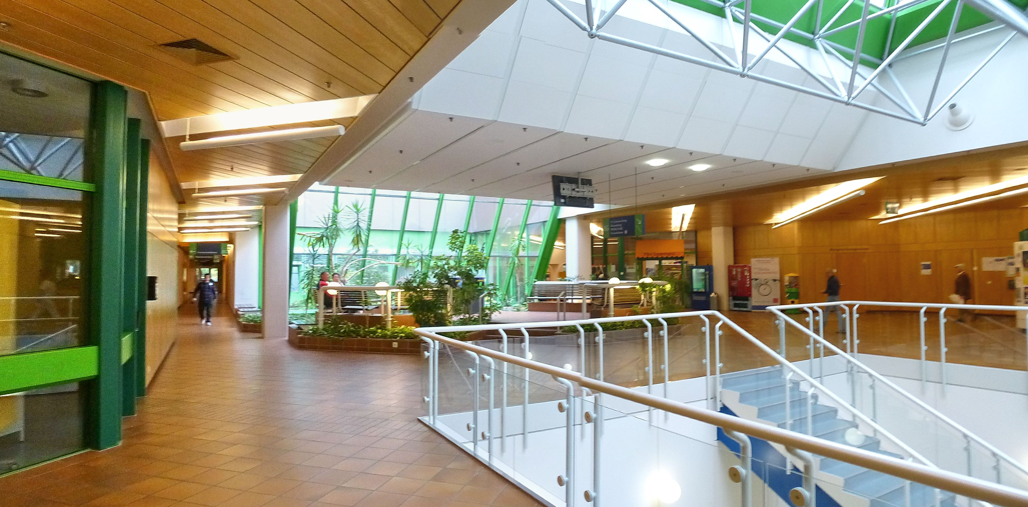 Klinikum Bogenhausen, München, Innenansicht, EG-Ebene